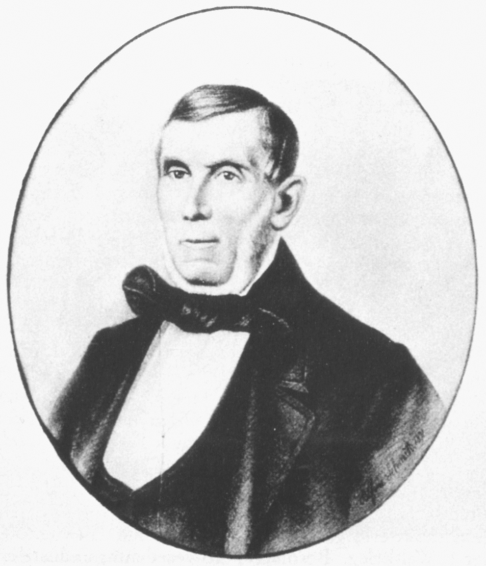 Michael Kahn († 1861), Gründer des altbadischen Feder- und Daunengewerbes